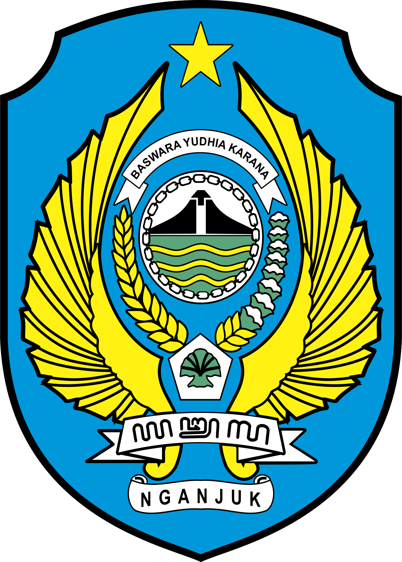 ini adalah logo penyempurnaan